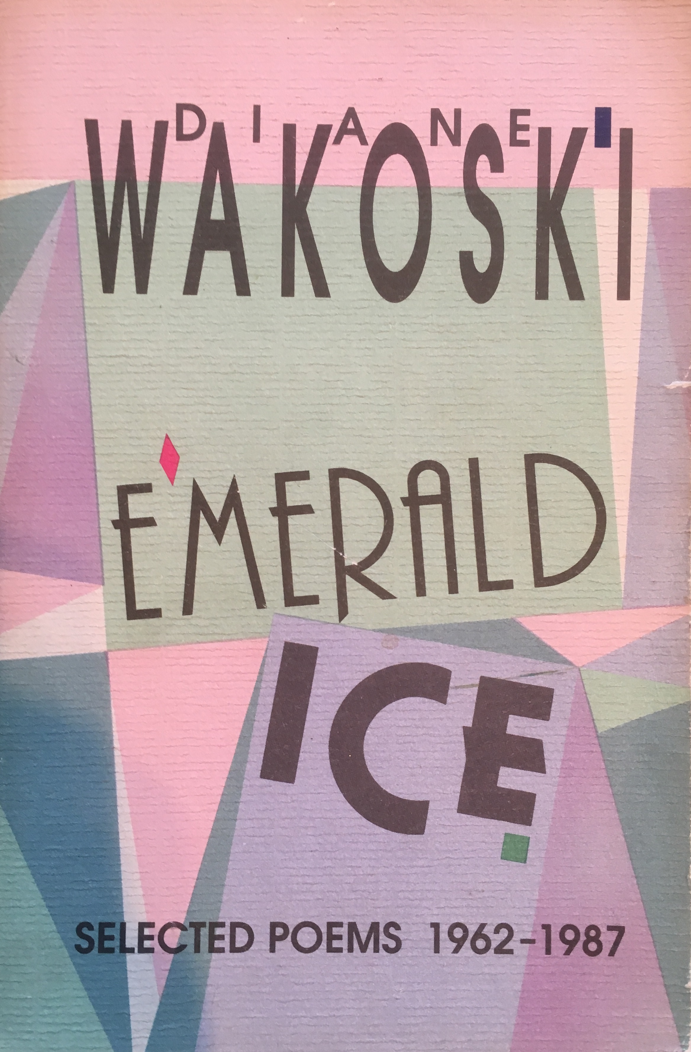 Diane Wakoski, Emerald Ice: Selected Poems, 1962-1987 (Santa Rosa: Black Sparrow Press), 1988.